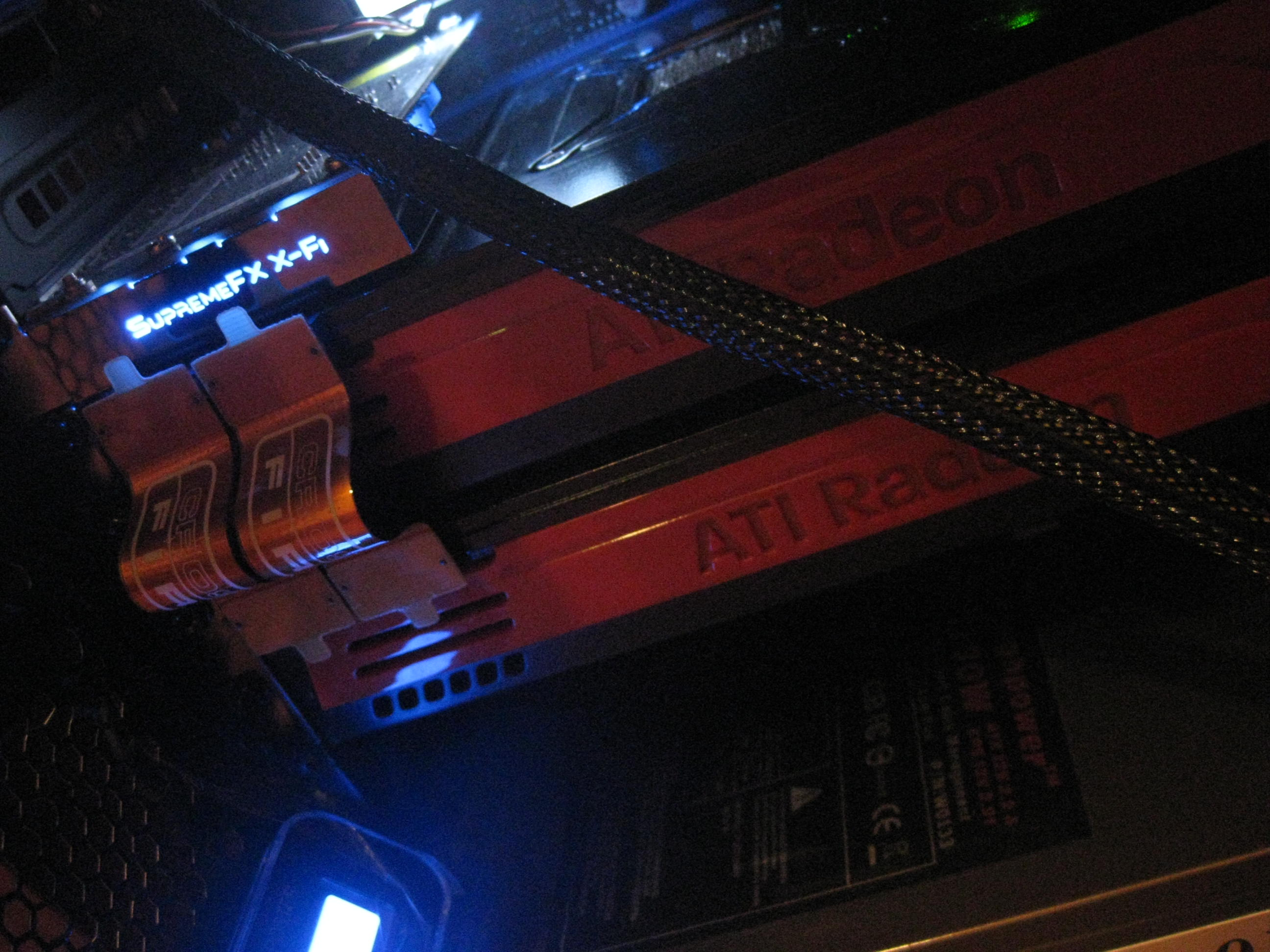 ATI CrossFireX connected videocards